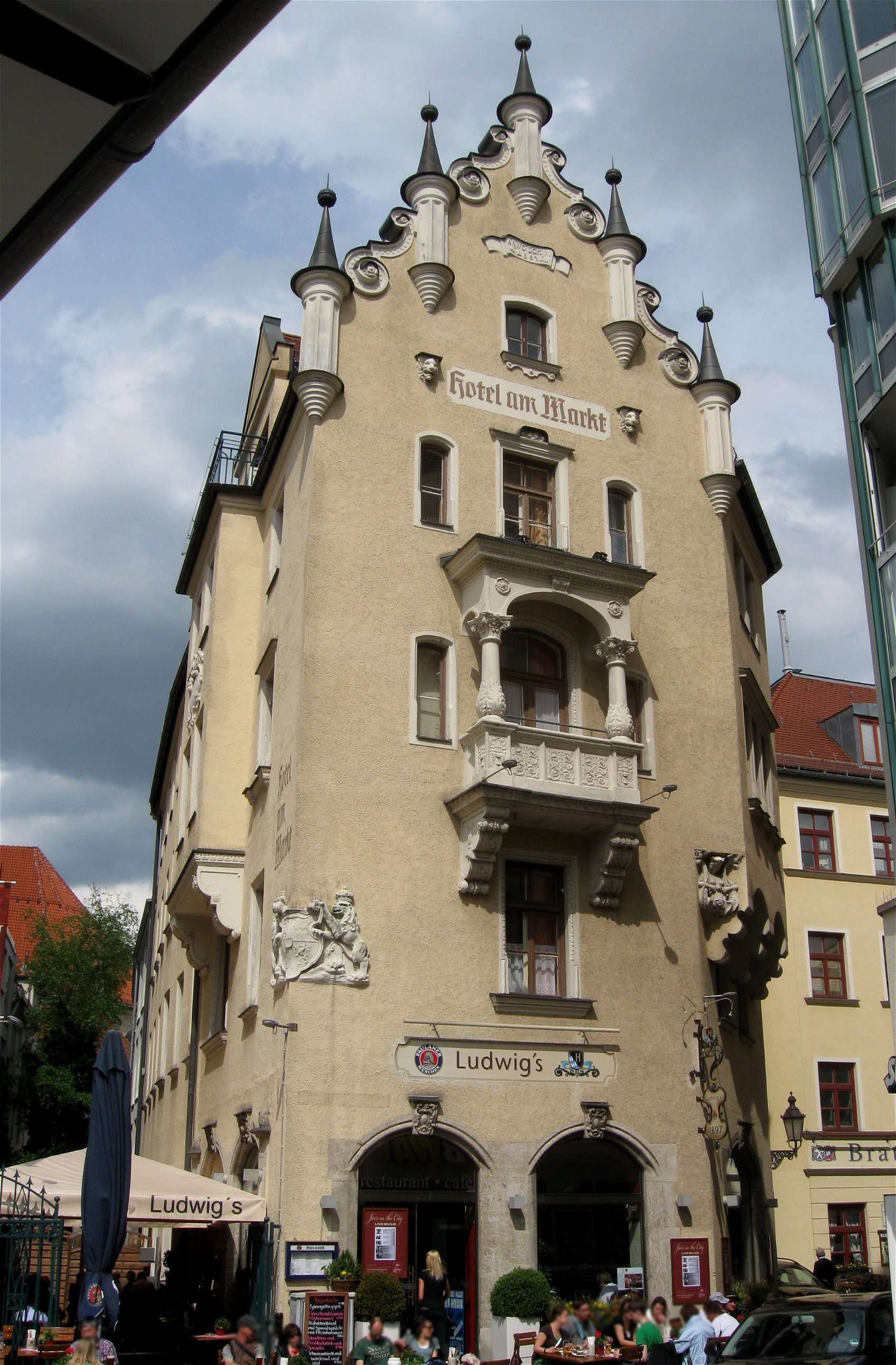 München, Heiliggeiststraße 6, malerischer Eckbau in deutscher Renaissance, reiche Giebelseite zum Viktualienmarkt, 1897 von Ludwig Marckert.